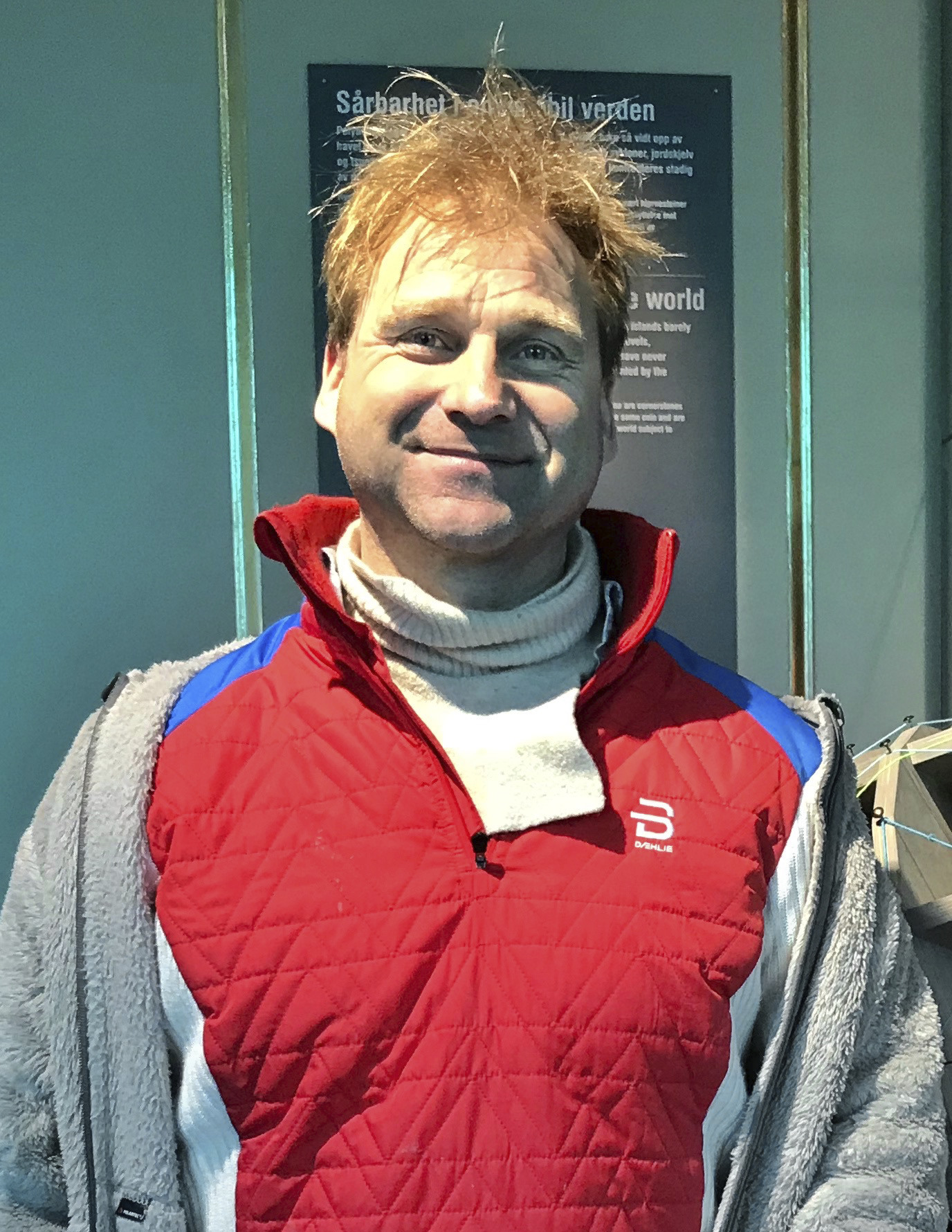 Kunstneren Vebjørn Sand på Kollaps utstilling